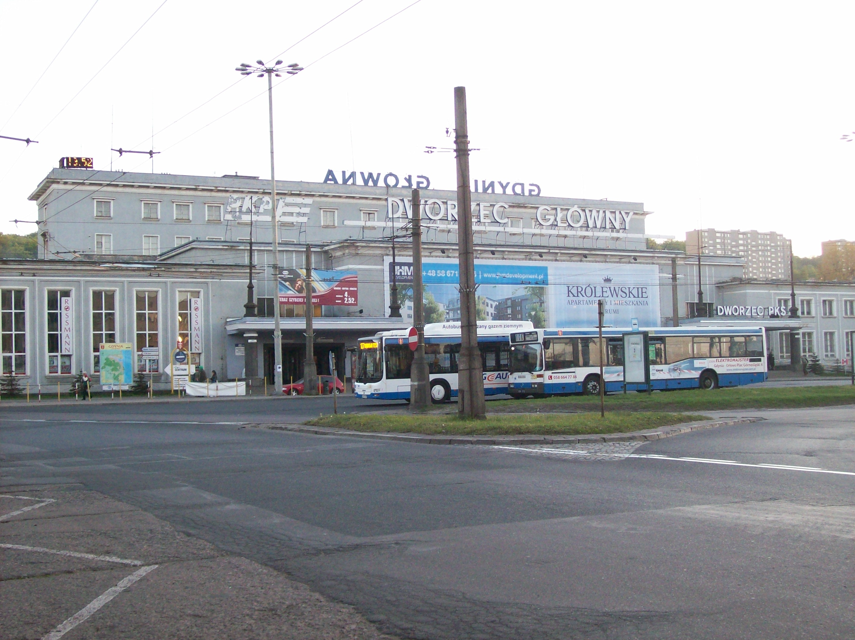 Dworzec kolejowy Gdynia Główna - widok z Placu Konstytucji.